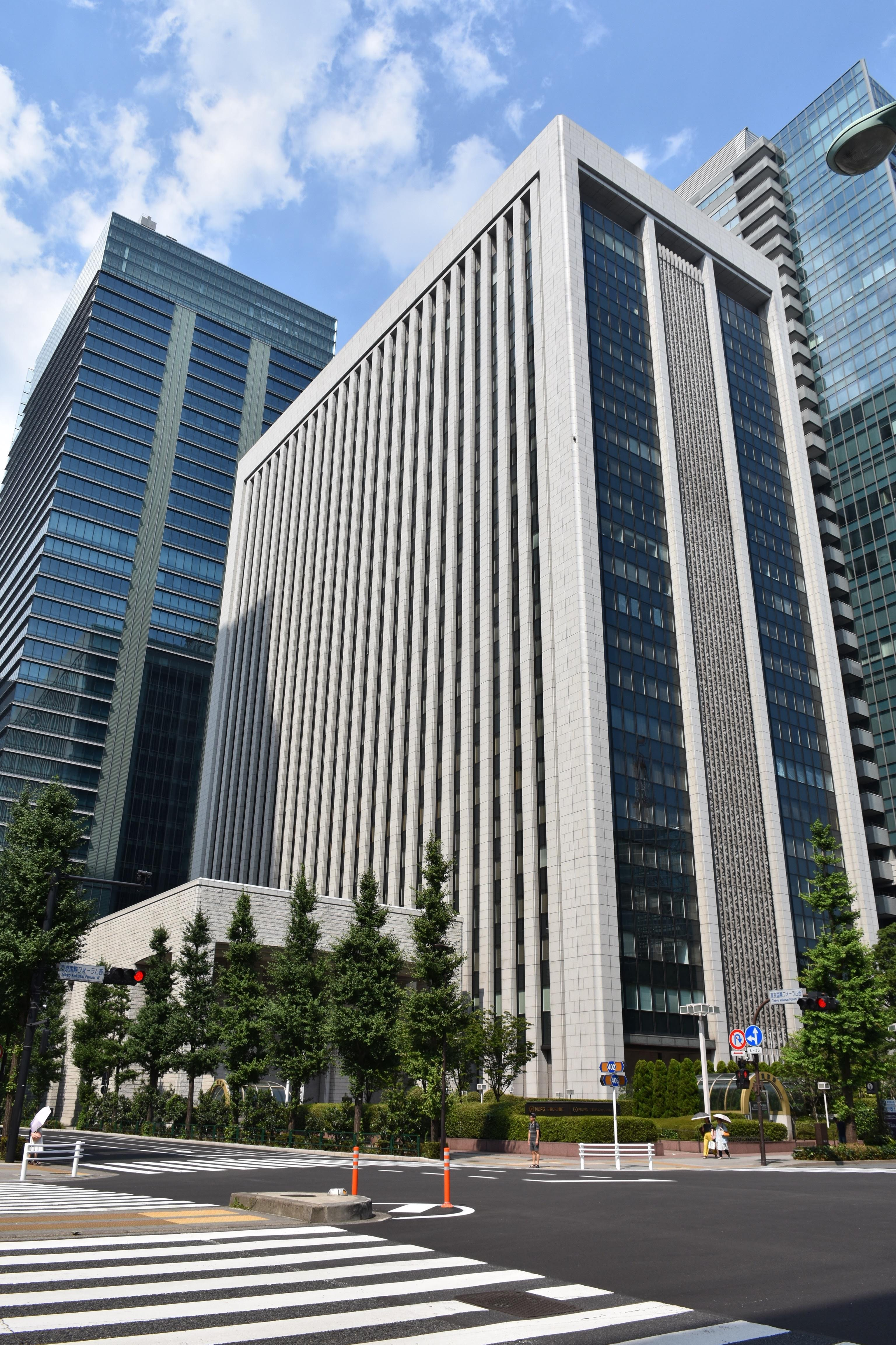 Kantor pusat MUFG Bank (bersama kantor pusat Mitsubishi UFJ Financial Group, Inc.) di Marunouchi, Chiyoda-ku, Tokyo, Jepang.